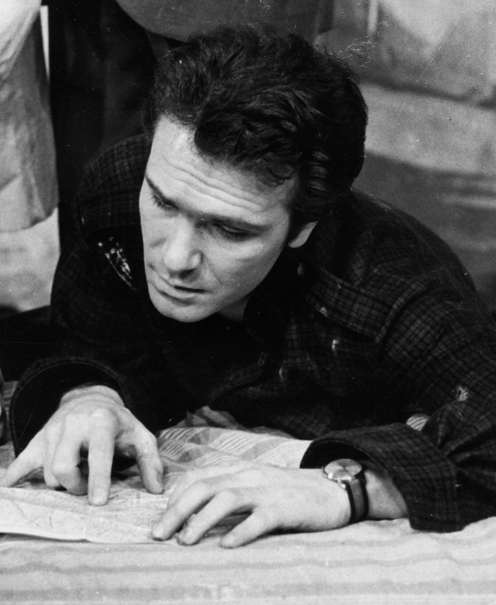 Tordy Géza a Nemzet Színésze címmel kitüntetett, Kossuth-díjas és kétszeres Jászai Mari-díjas magyar színész, rendező, érdemes és kiváló művész.